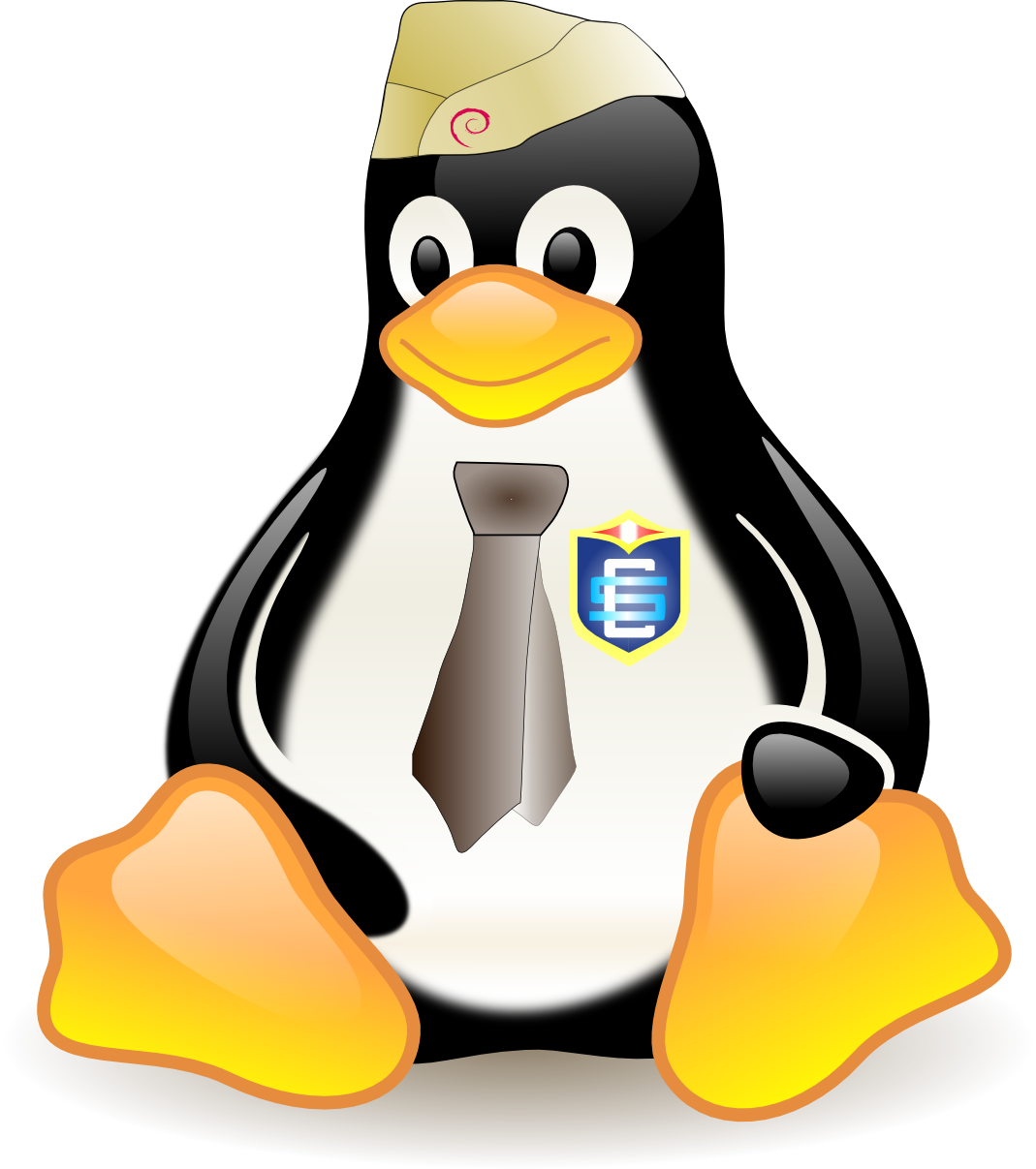 Tux Carolino, ideado por Sdenka Salas Pilco.